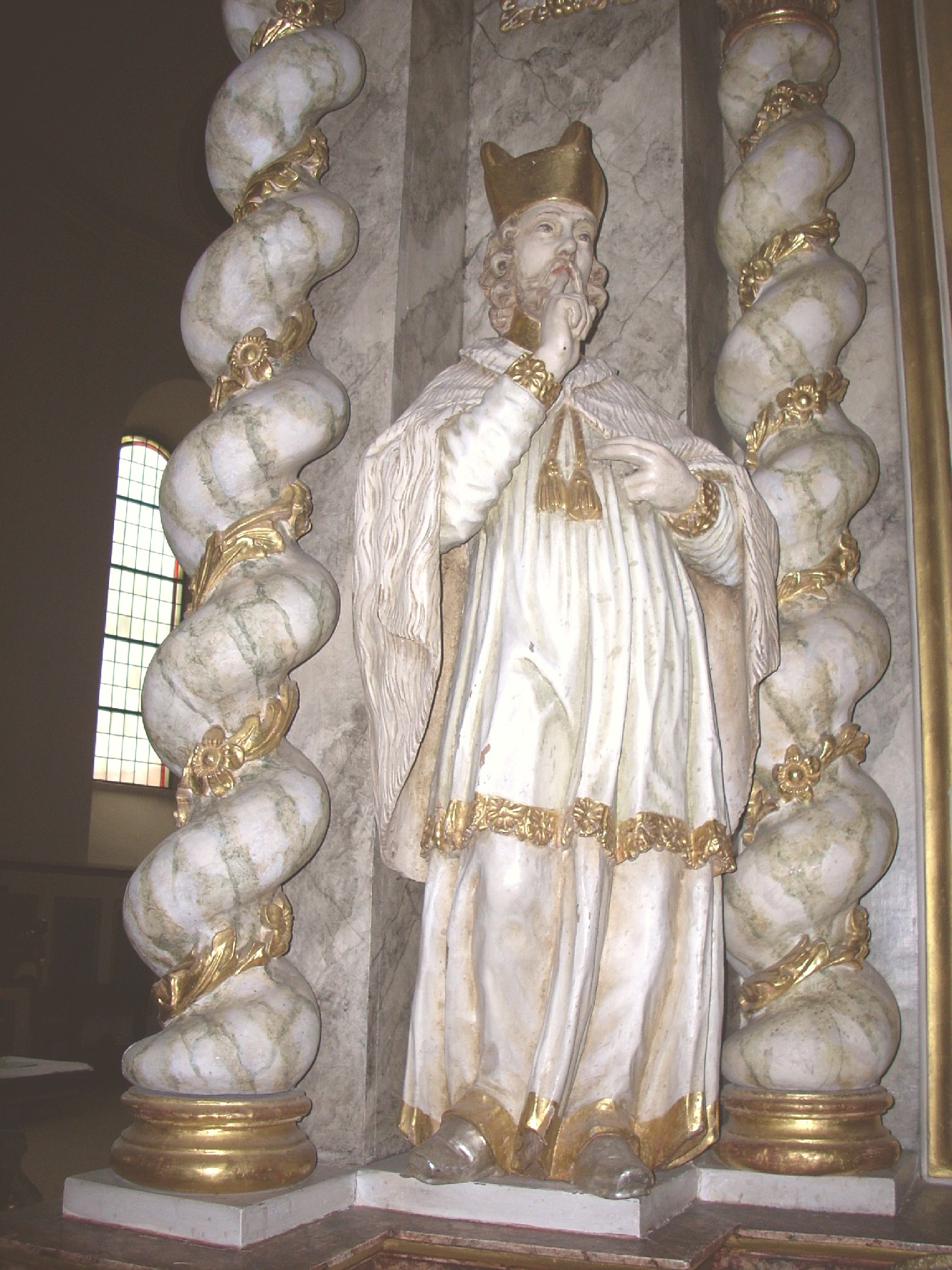 Algermissen, St. Matthäus Catholic Church, St. Johannes Nepomuk